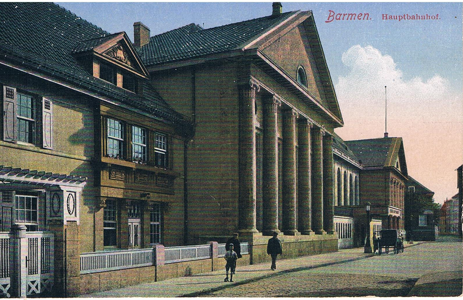 Barmen Hauptbahnhof